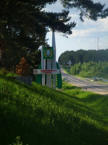 граница Могилёвской и Гомельской области влизи посёлка Ильич (Беларусь)